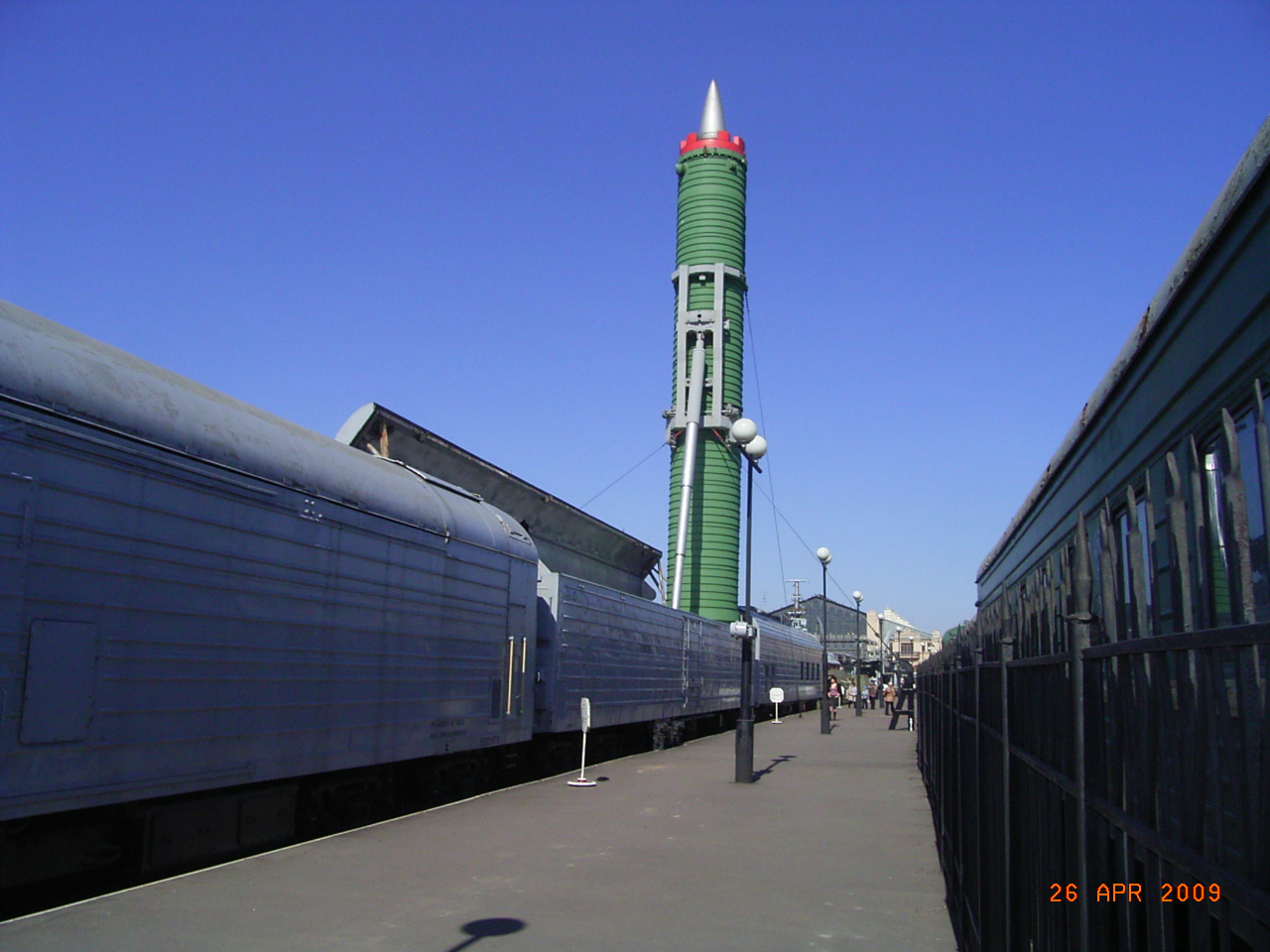 Eisenbahnstationierter Interkontinentaler Raketenkomplex BShKR Russlands.